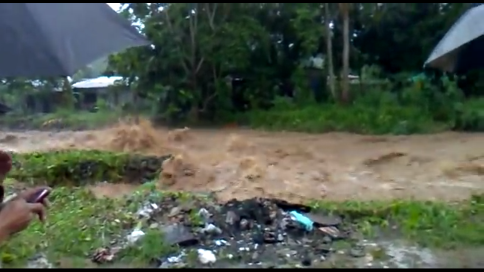 Único El Monte Río Siquirres